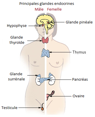 Traduction française de